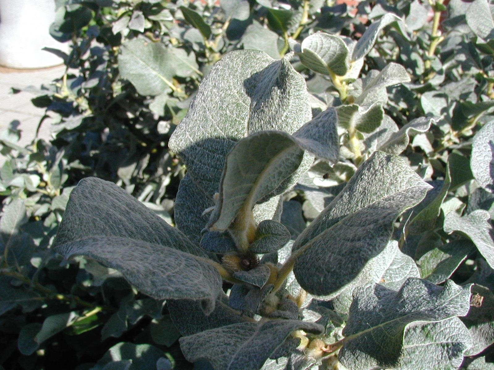 Salix lanata: Leaves